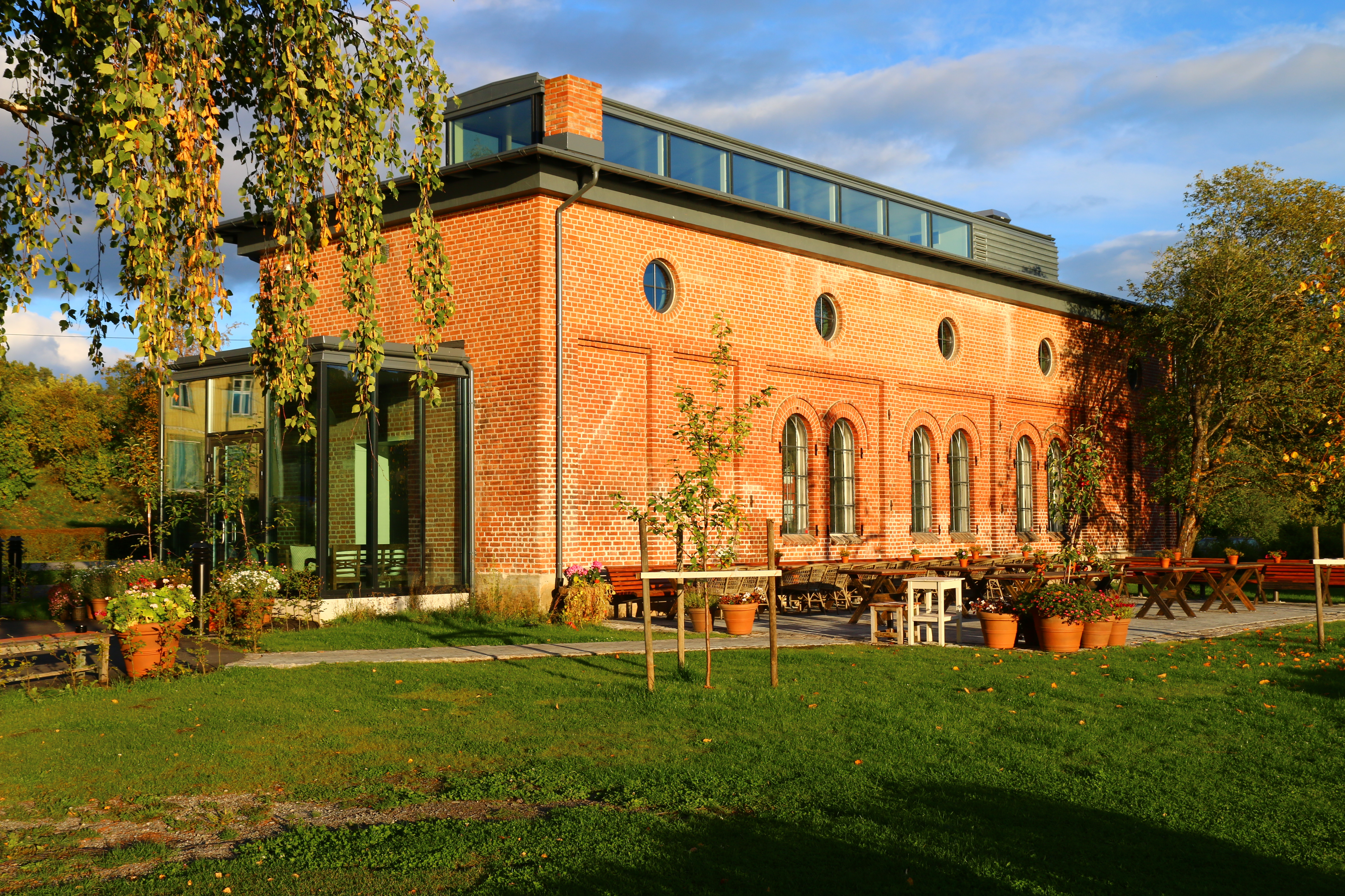 Lokomotivstallen i Røykenvika ved Randsfjorden på Hadeland.